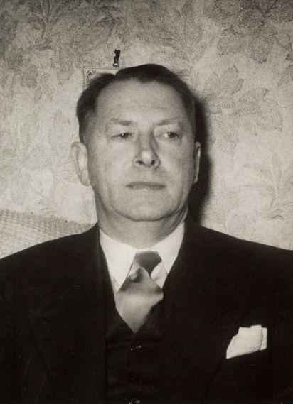 Portret van Mr. Hendrik Mulderije, Minister van Justitie van 1951-1952. 13 maart 1951.